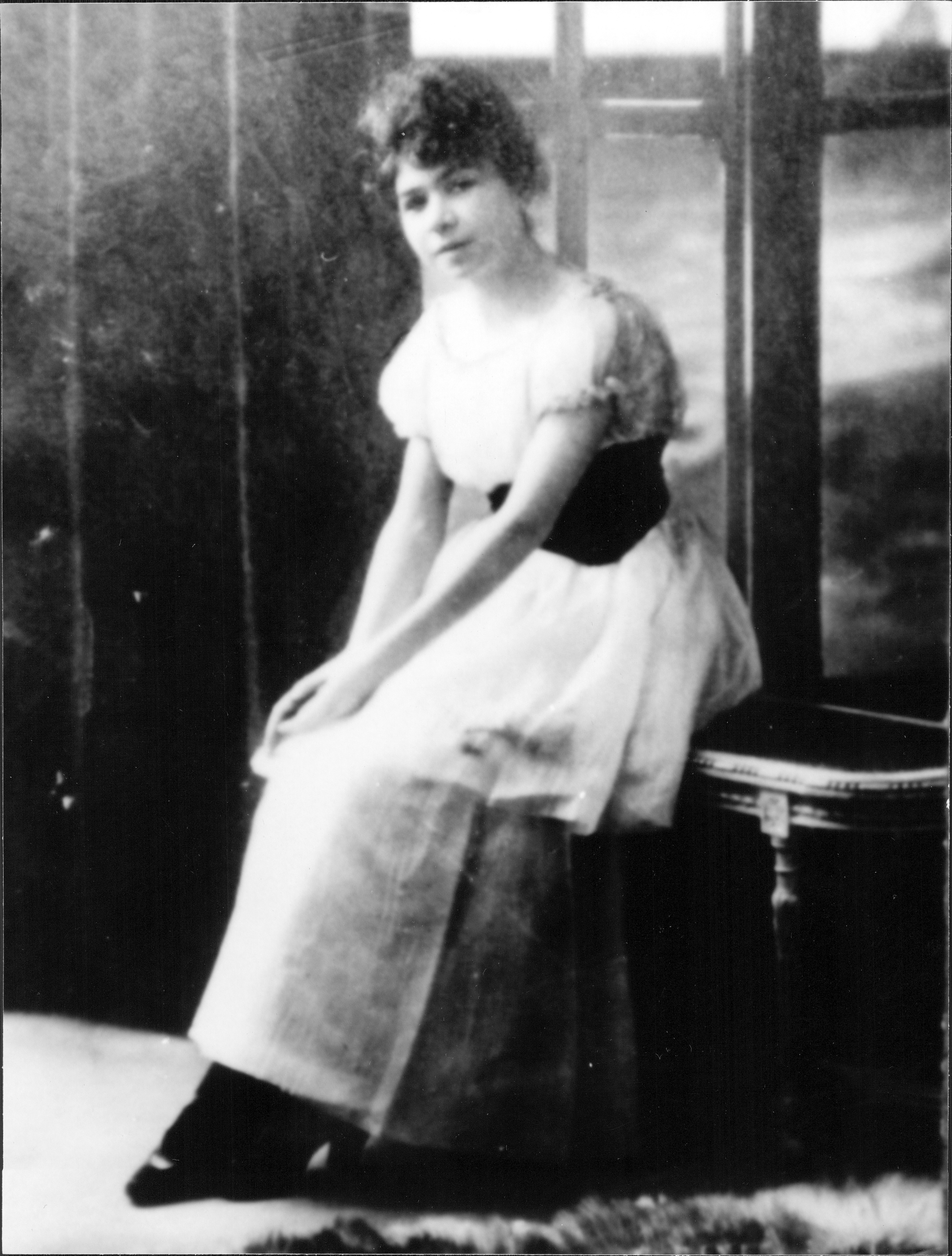 Alfonsina Storni a los 24 años cuando publicó "La inquietud del rosal". Inventario 7767 This file, was provided to Wikimedia Commonsthanks to an agreement between the General Archive of the Nation of Argentina and Wikimedia Argentina.